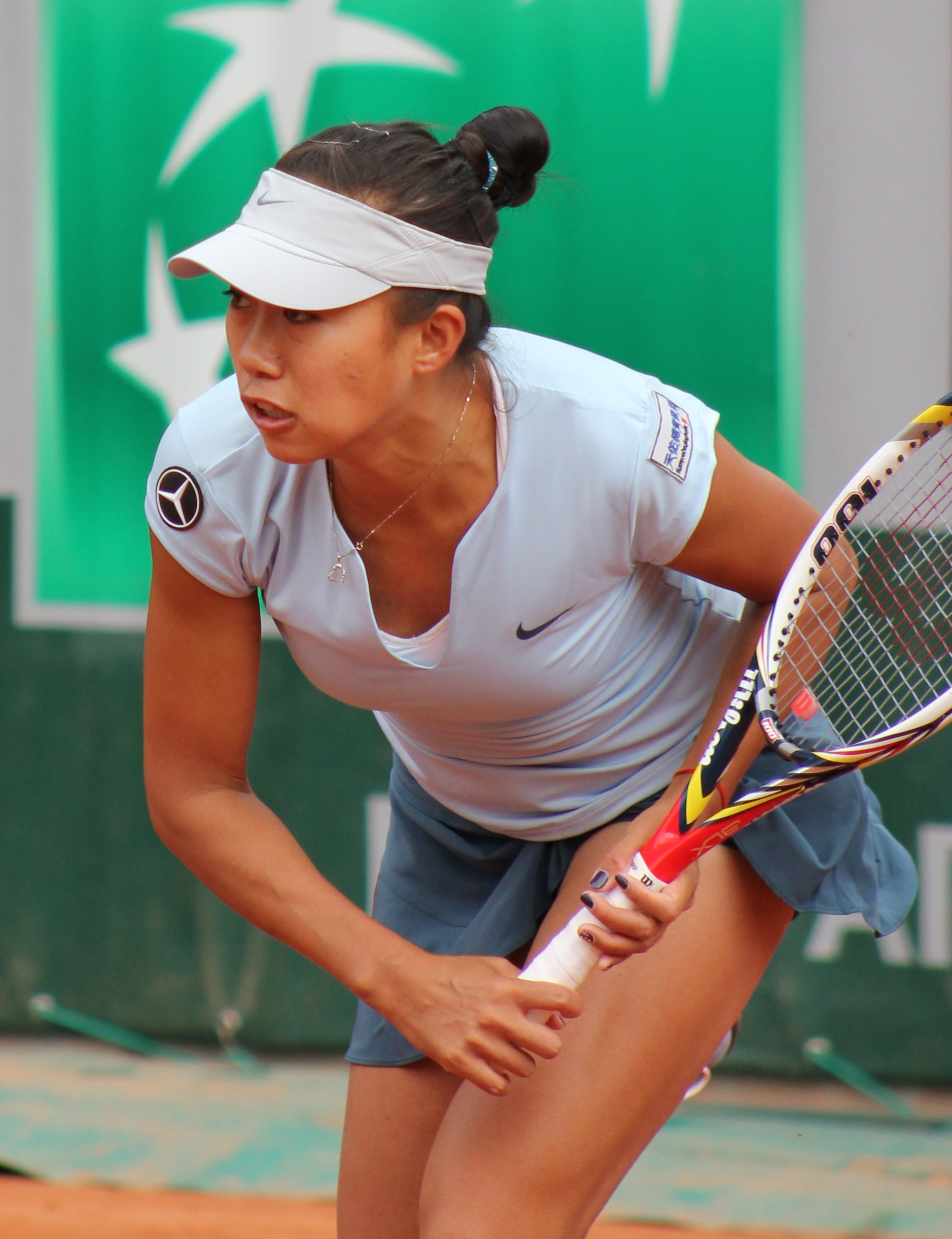 Zhang RG13 (3)